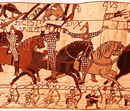 Bayeux Tapestry fragment